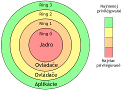 Príklad použitia privilegovaných prstencov v klasickom operačnom systéme